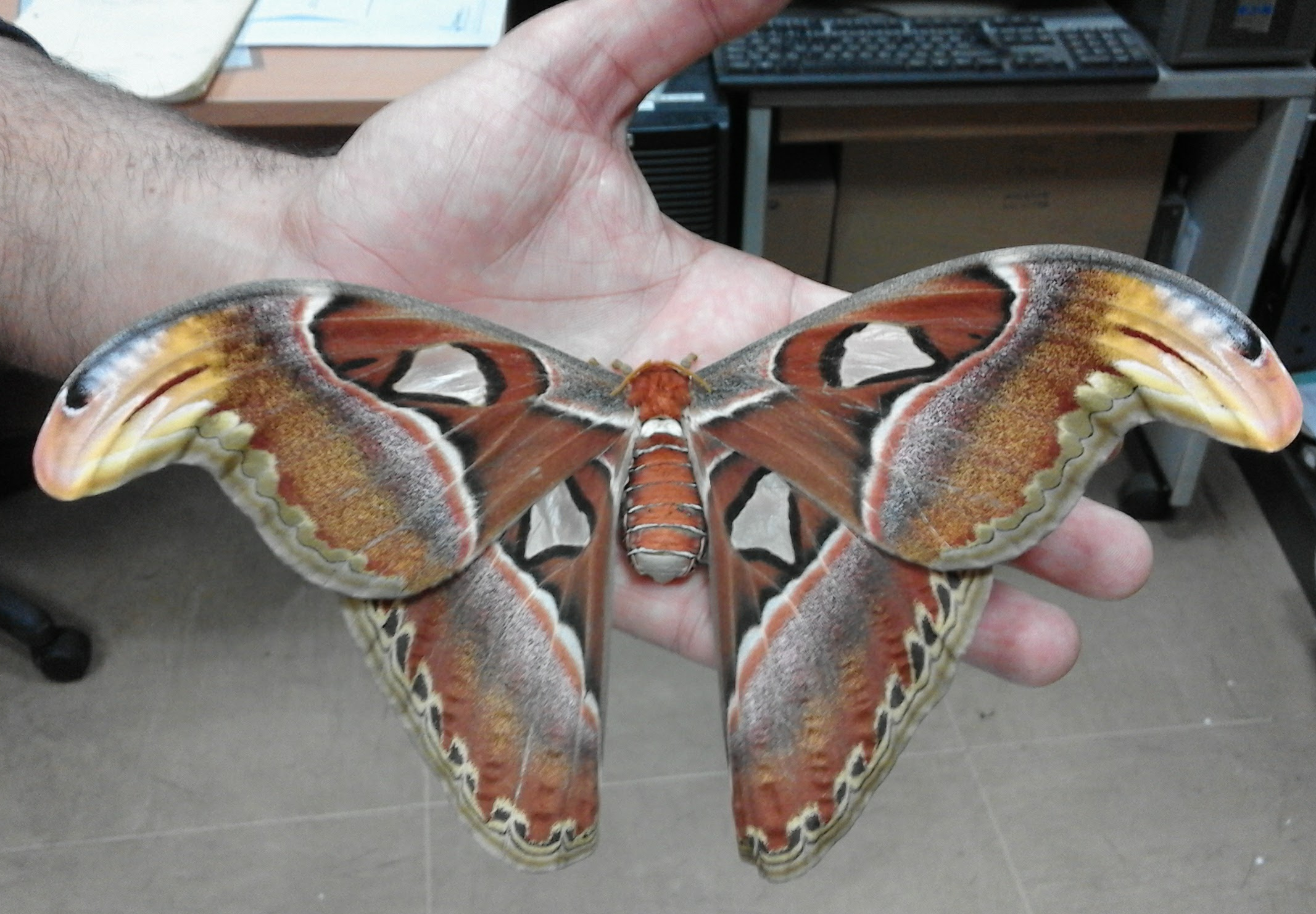 Mariposa de un día criada en cautividad en España